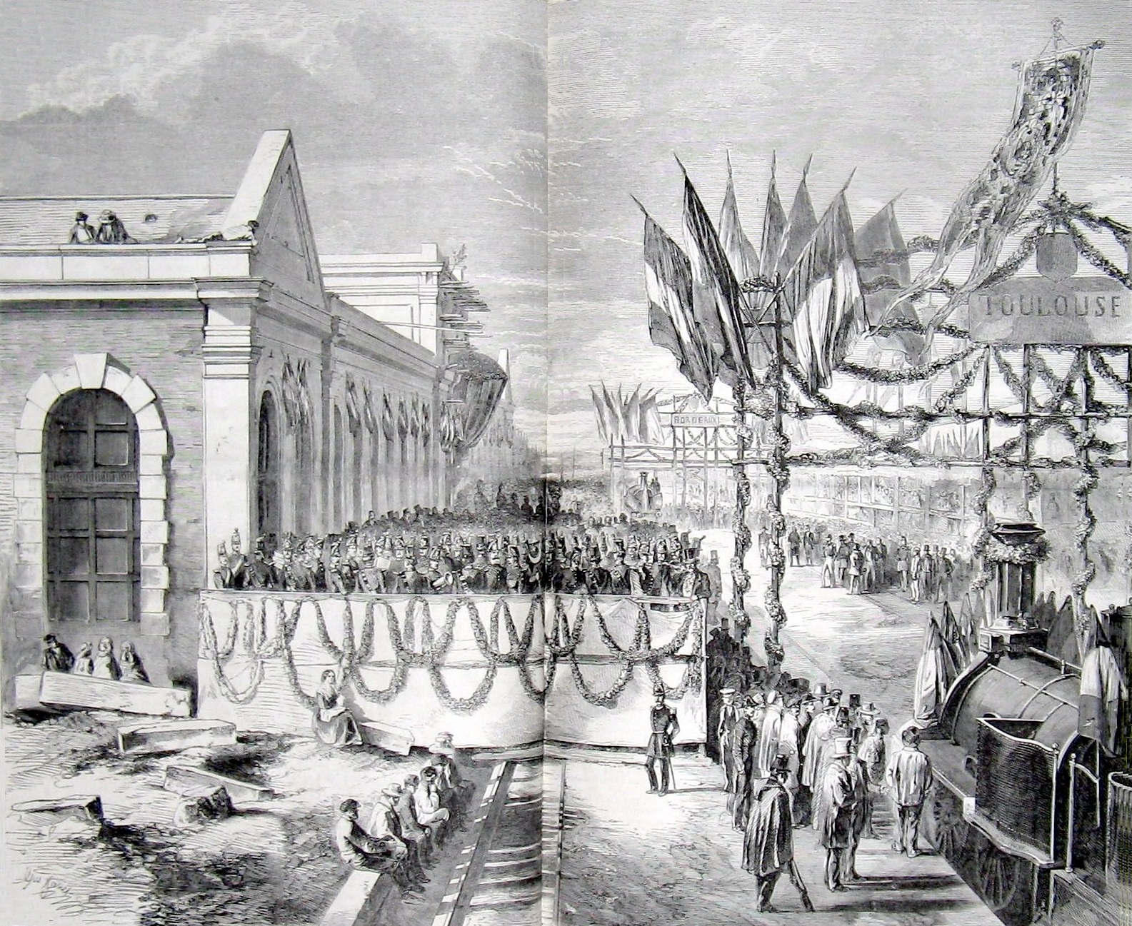 Inauguration du chemin de fer de Toulouse à Cette, d'après une photographie de M. Le Gray